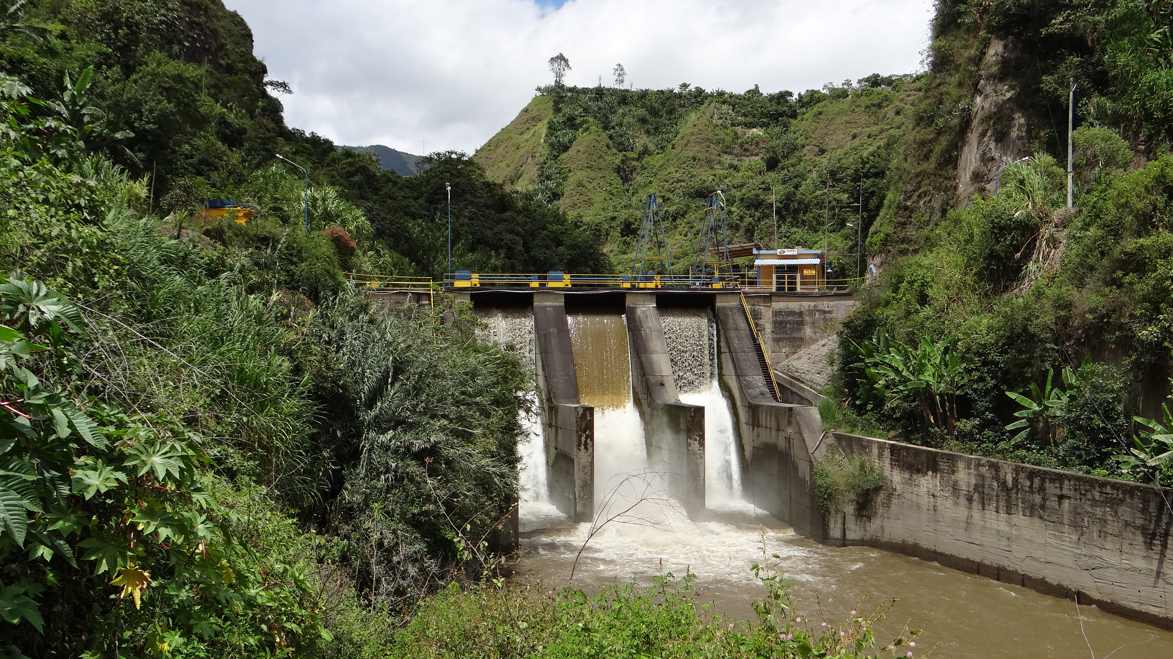 Represa del río mayo de donde se nutre la hidroeléctrica del Mayo.